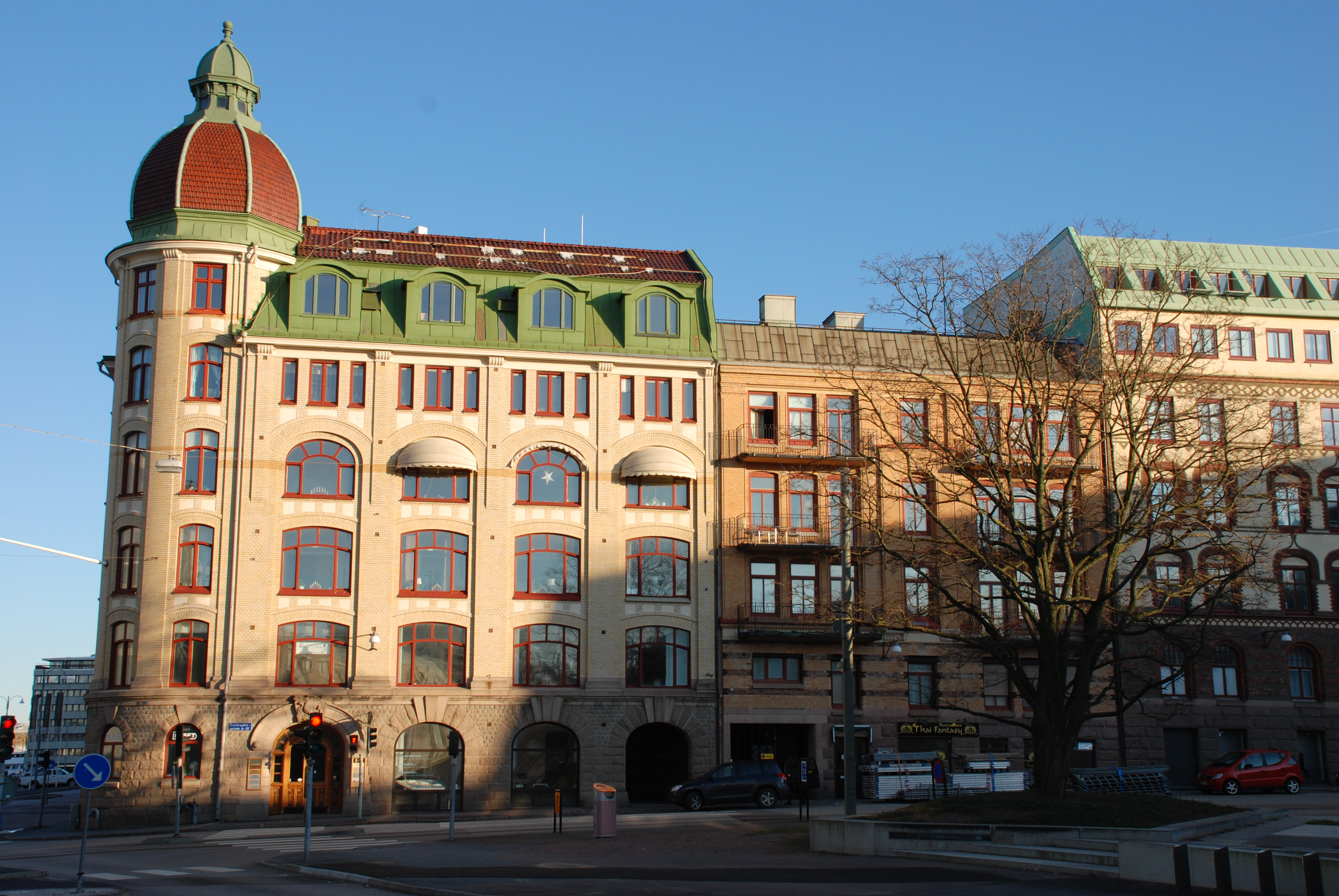 Kvarteret Surbrunnen vid Surbrunnsgatan i Göteborg. Unknown